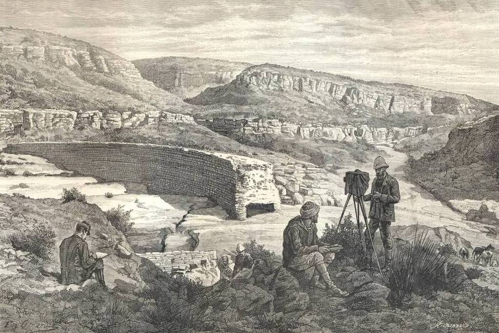 Barrage de Kasserine sur l'oued Eddarb (Tunisie) sur une gravure ancienne